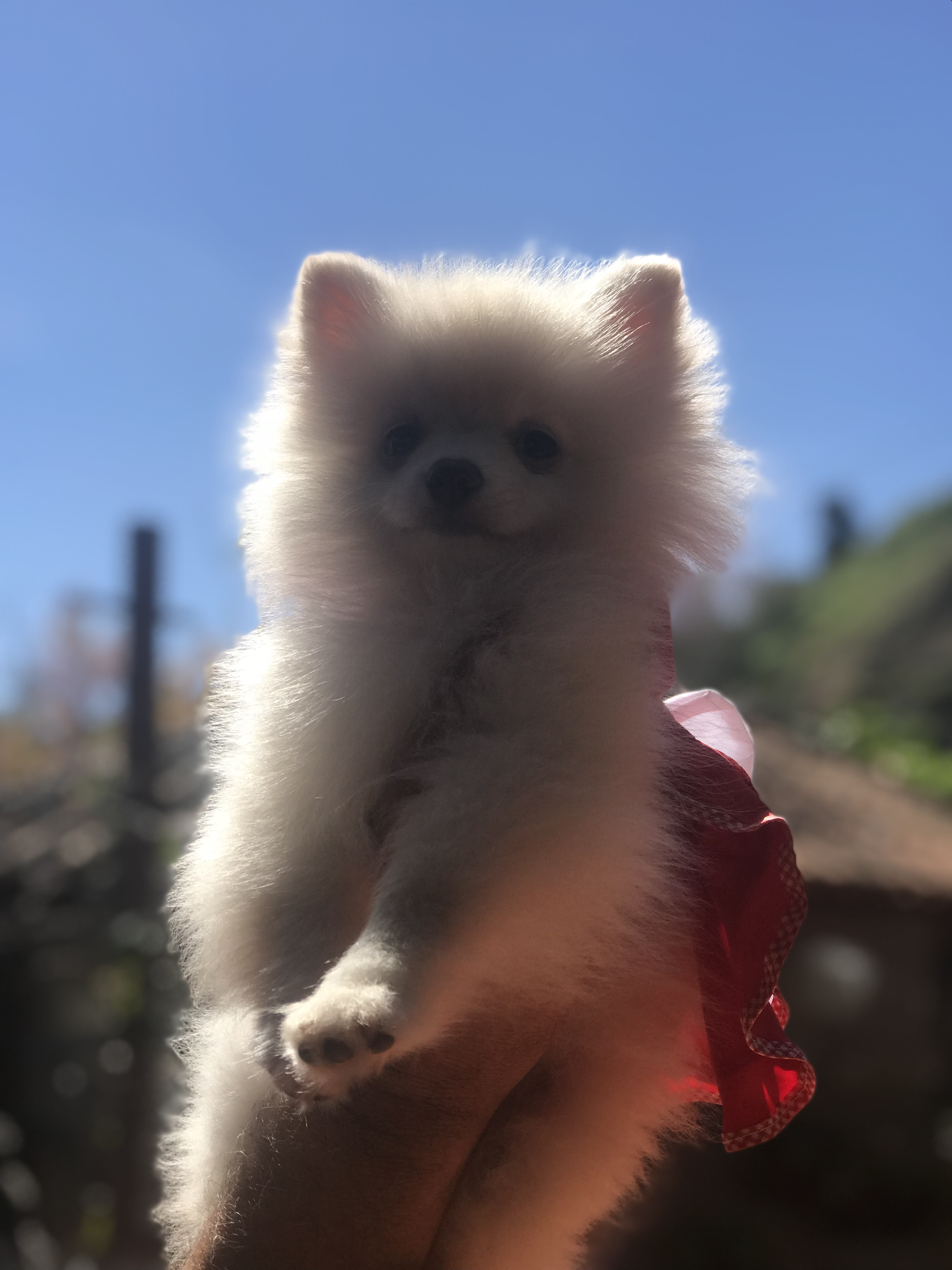 Spitz fêmea